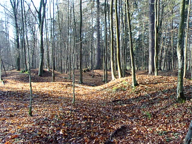 Skupisko kurhanów w północnej części rezerwatu Szczekotowo